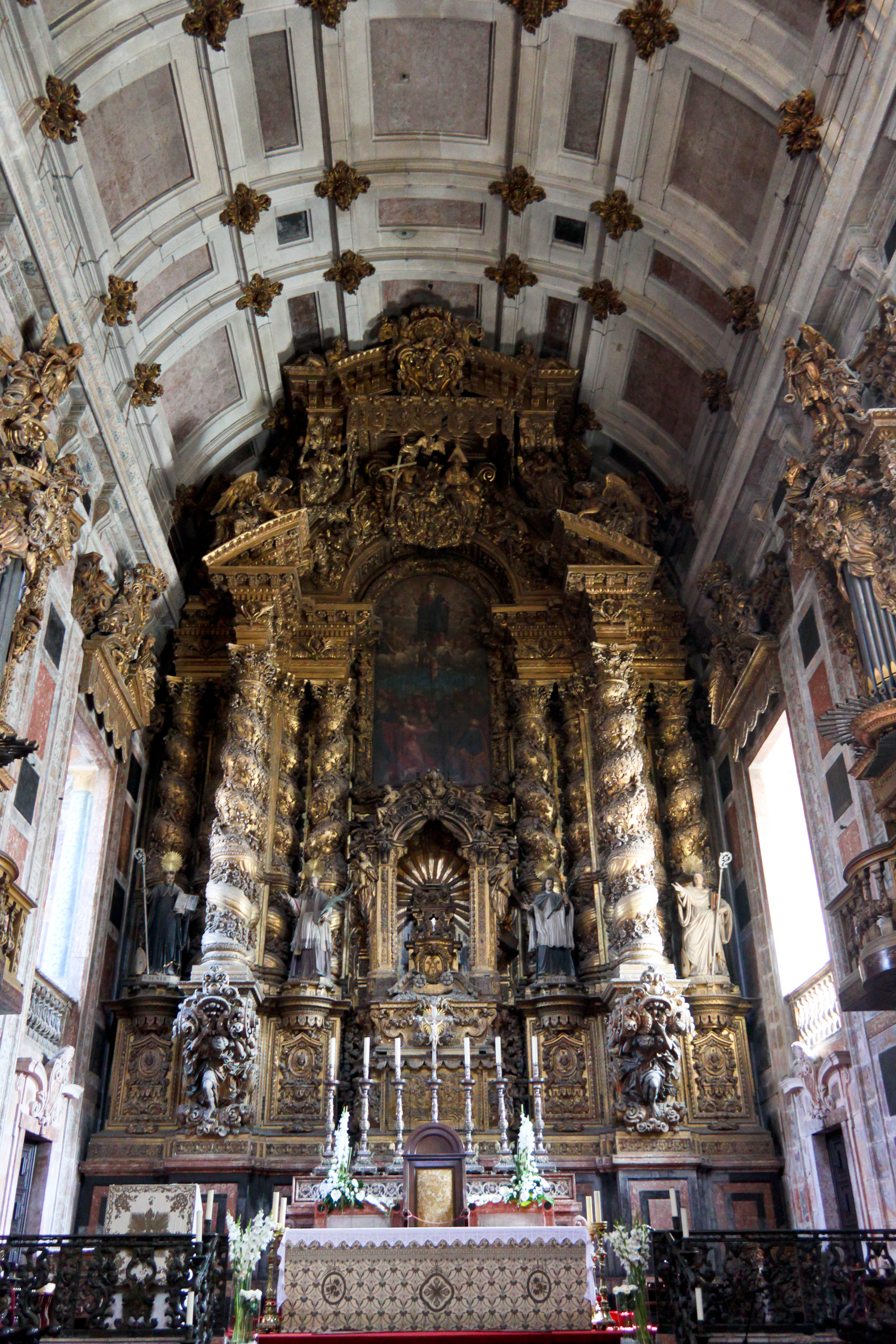 Sé Catedral - Capela Mor This file was uploaded for Wiki Loves Monuments in Portugal with the unique identifier 70397.